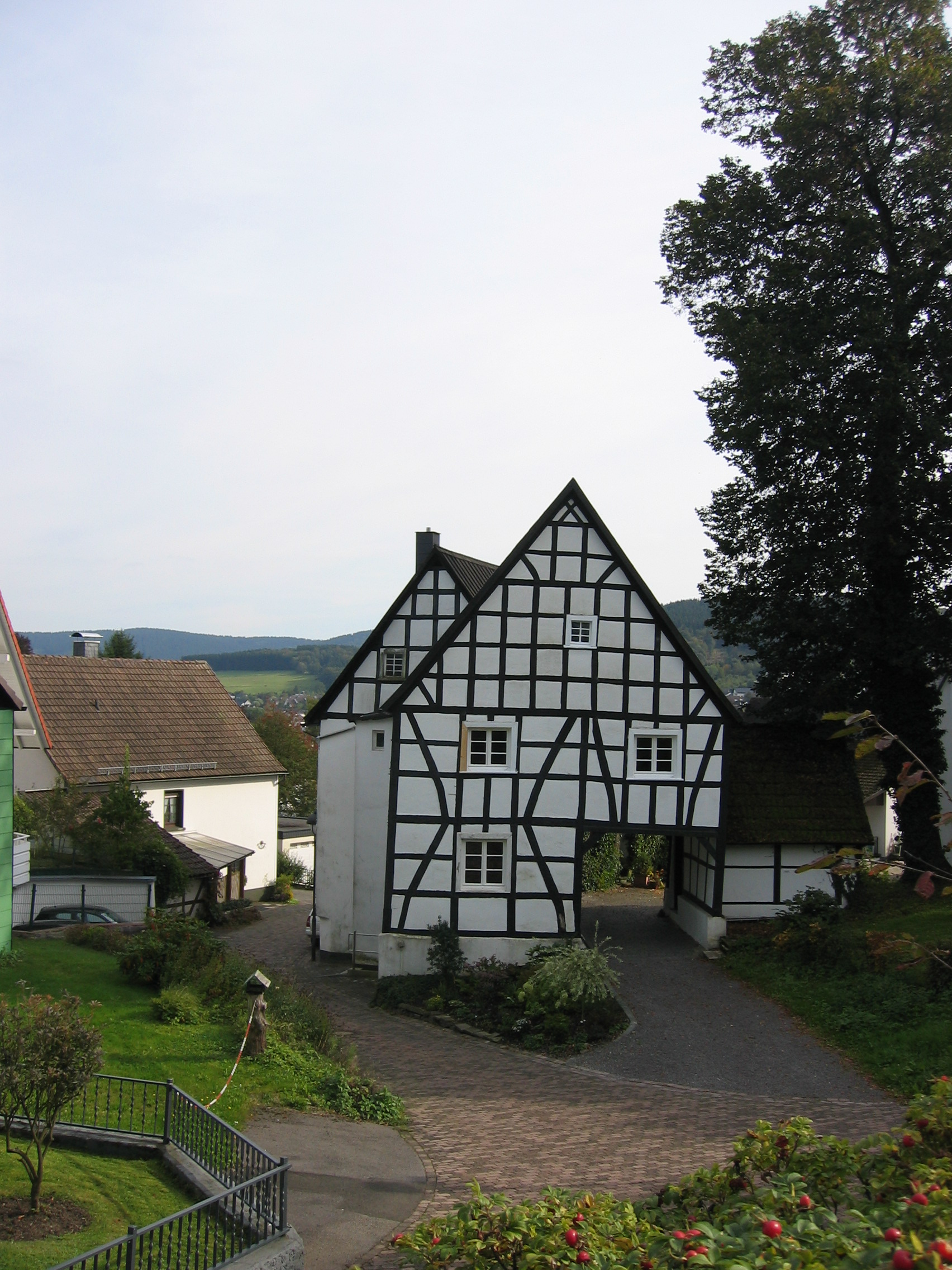 Herscheider Spieker